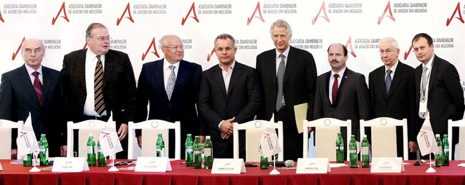 Asociaţia Oamenilor de Afaceri din Moldova